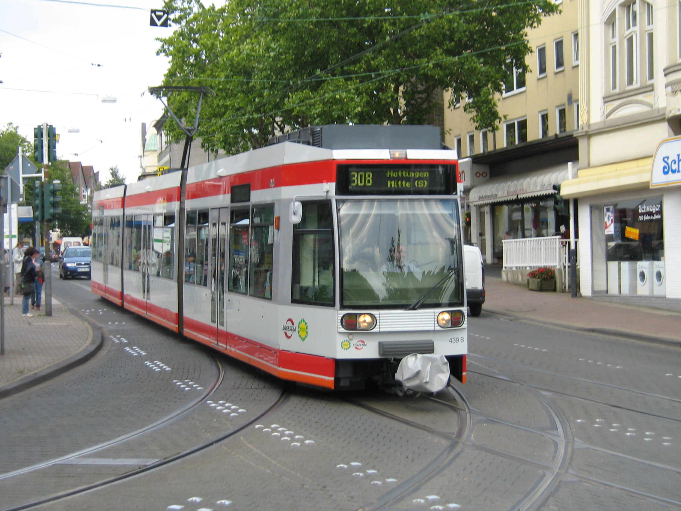 NF6D der Bogestra in Bochum-Linden